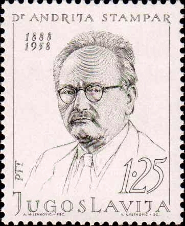 Andrija Štampar